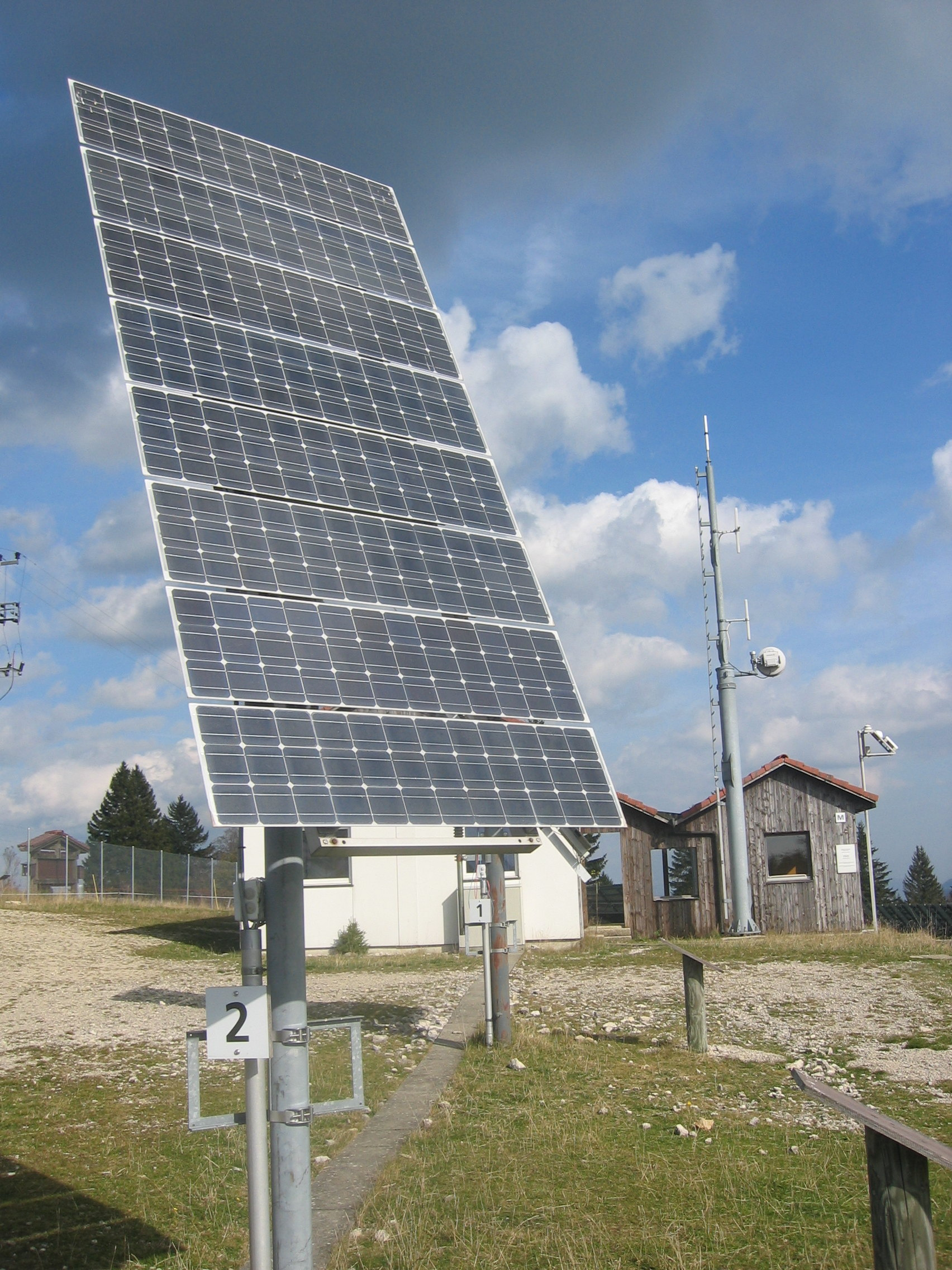 Panneaux photovoltaïques, Centrale solaire de Mont-Soleil, St-Imier